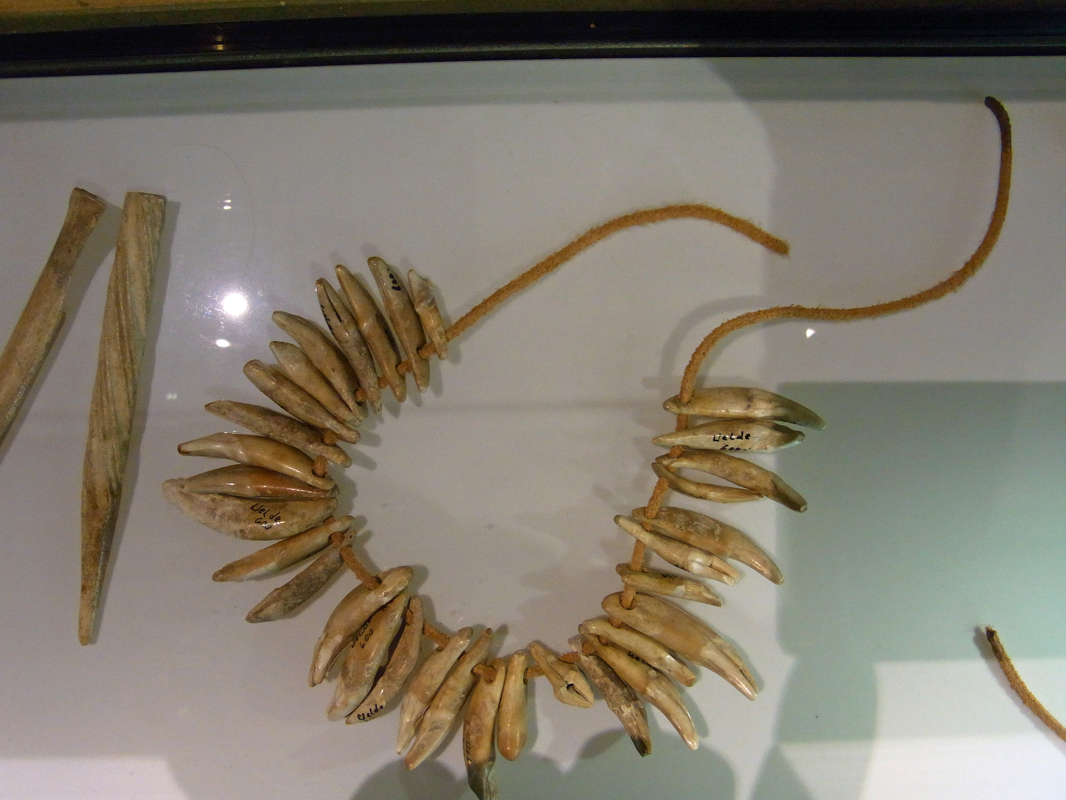 LWL-Museum für Archäologie 3500 - 2700 v.Chr.